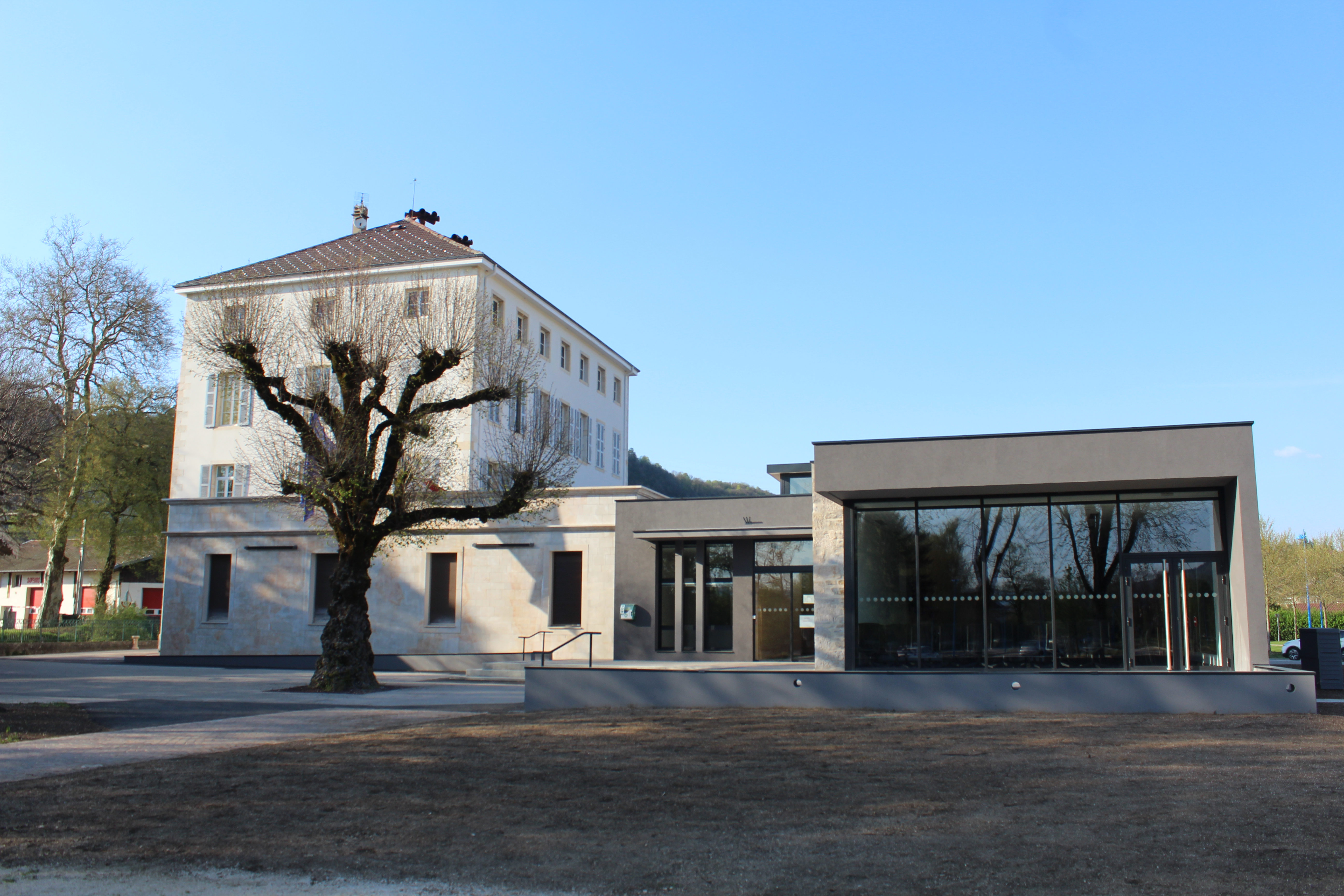 Mairie de Montréal-la-Cluse.